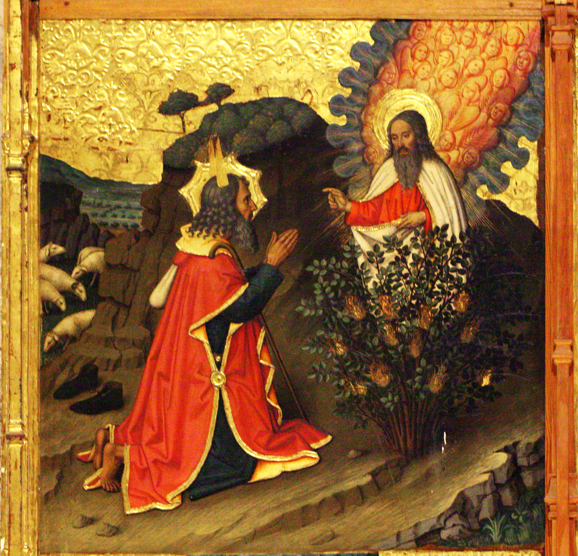 Taula de Moisès i l'esbarzer ardent del “Retaule de la transfiguració” de Jaume Huguet a la sala de l´antic refectori dels canonges, de la catedral de Tortosa. La seva ubicació original era a la capella central de la girola, darrera l'altar major.